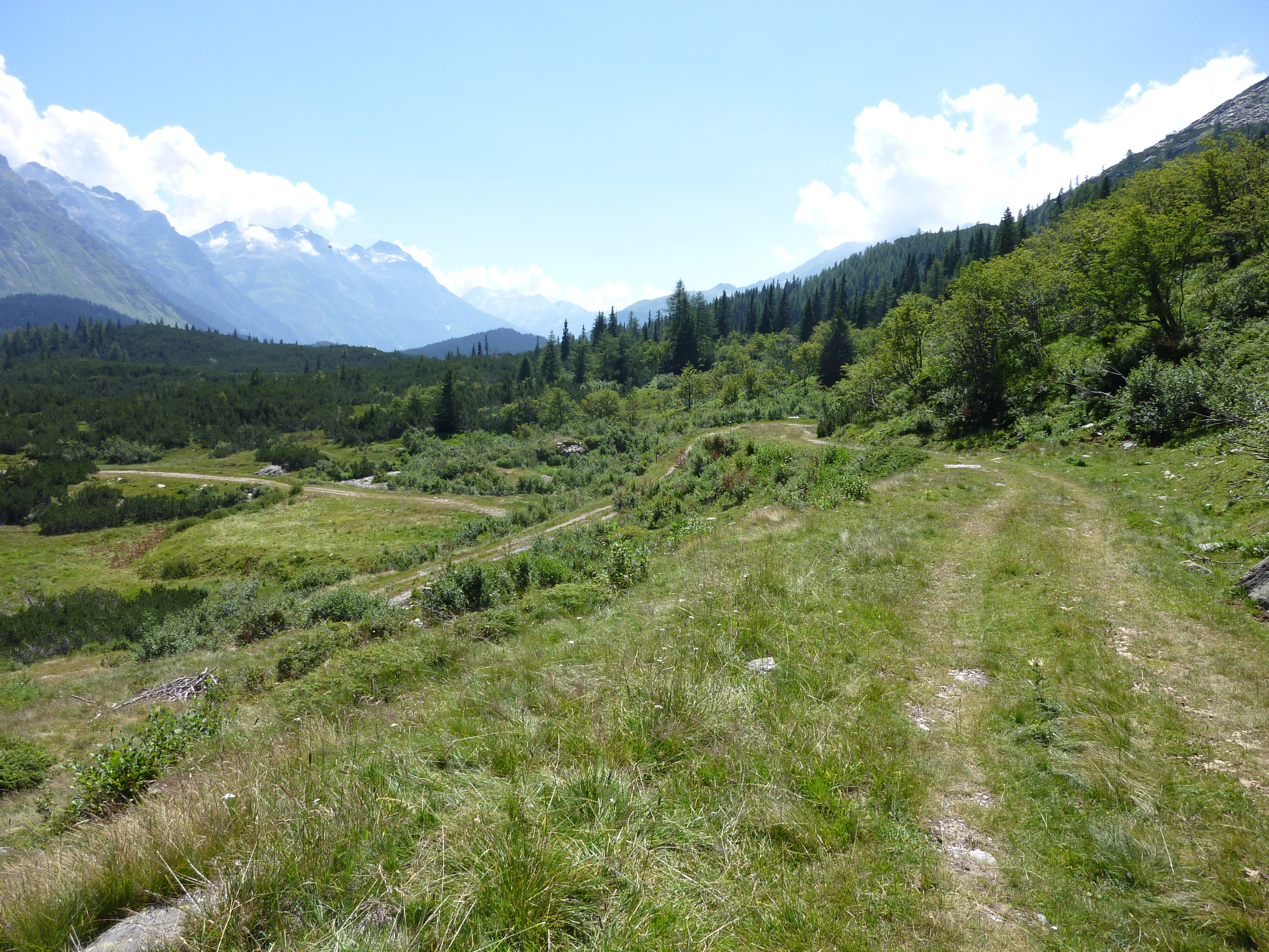 Brücke Vittorio Emanuele: alte Trasse des Passstrasse